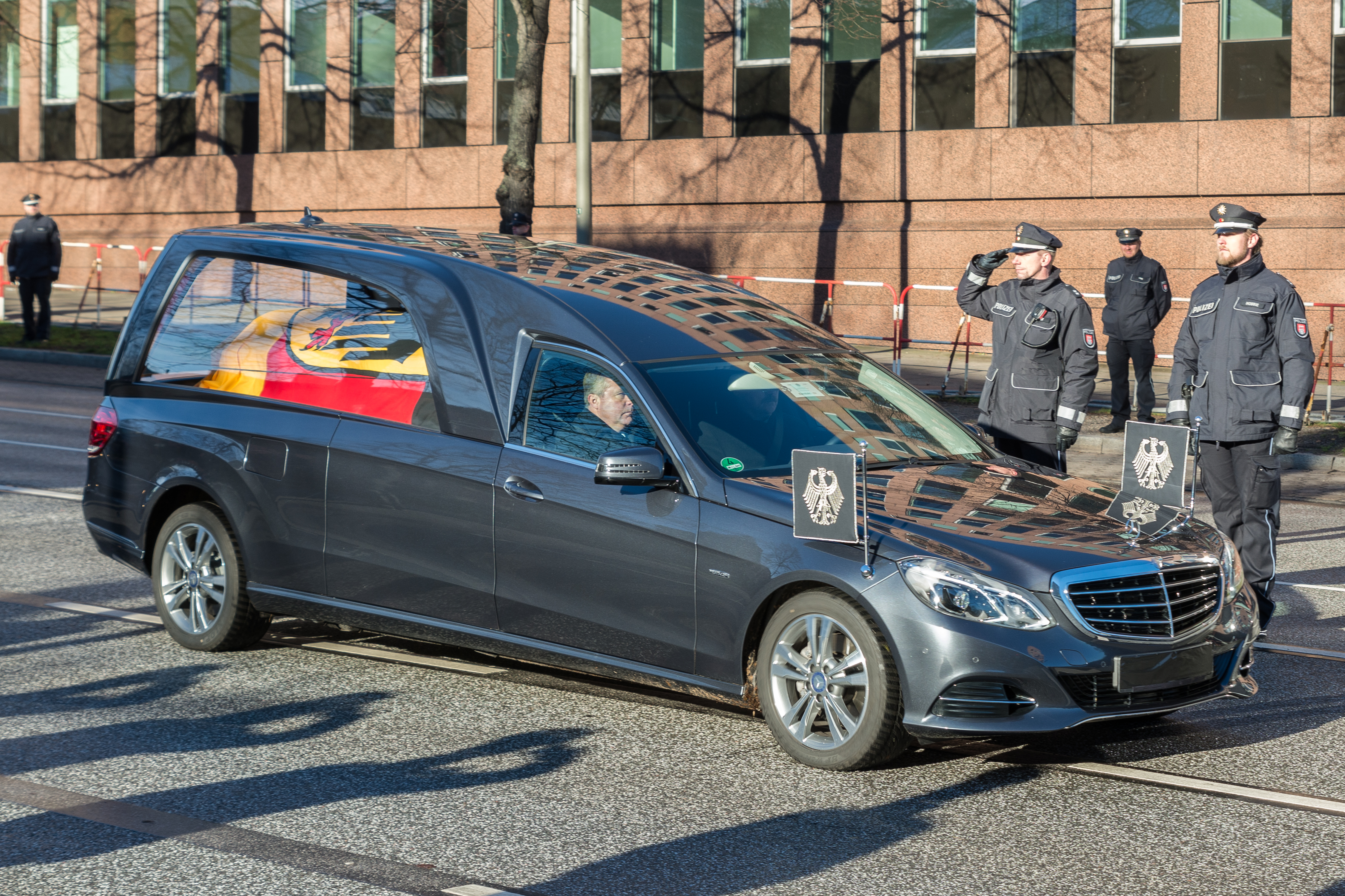 Beginn der Überführung des Leichnams von Helmut Schmidt von der Ludwig-Erhard-Straße in Hamburg-Neustadt zum Friedhof Ohlsdorf.